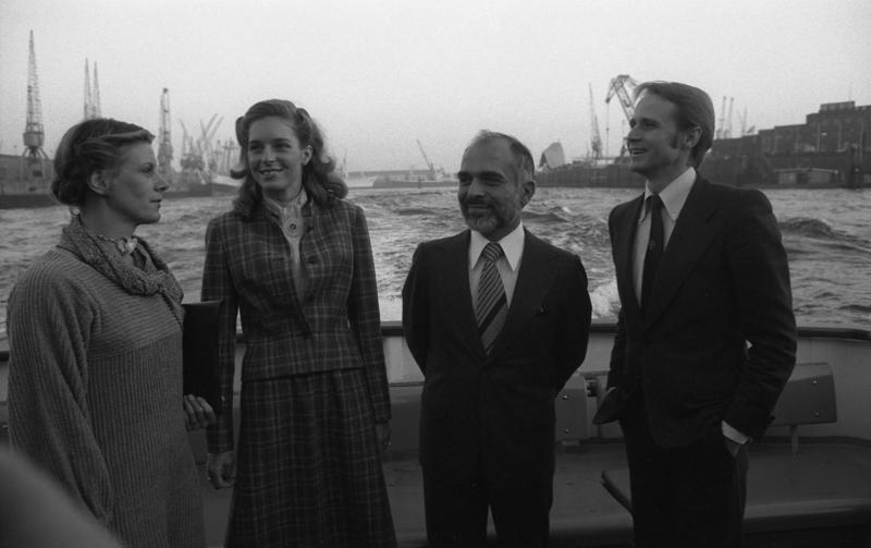 Staatsbesuch König Hussein II. und Königin Nur Al-Hussein in der Bundesrepublik Deutschland. Hamburgs Hafenrundfahrt in Begleitung von Bürgermeister Hans Ulrich Klose und Frau Elke.